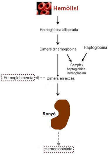 Esquema de l'hemòlisi de l'eritròcit